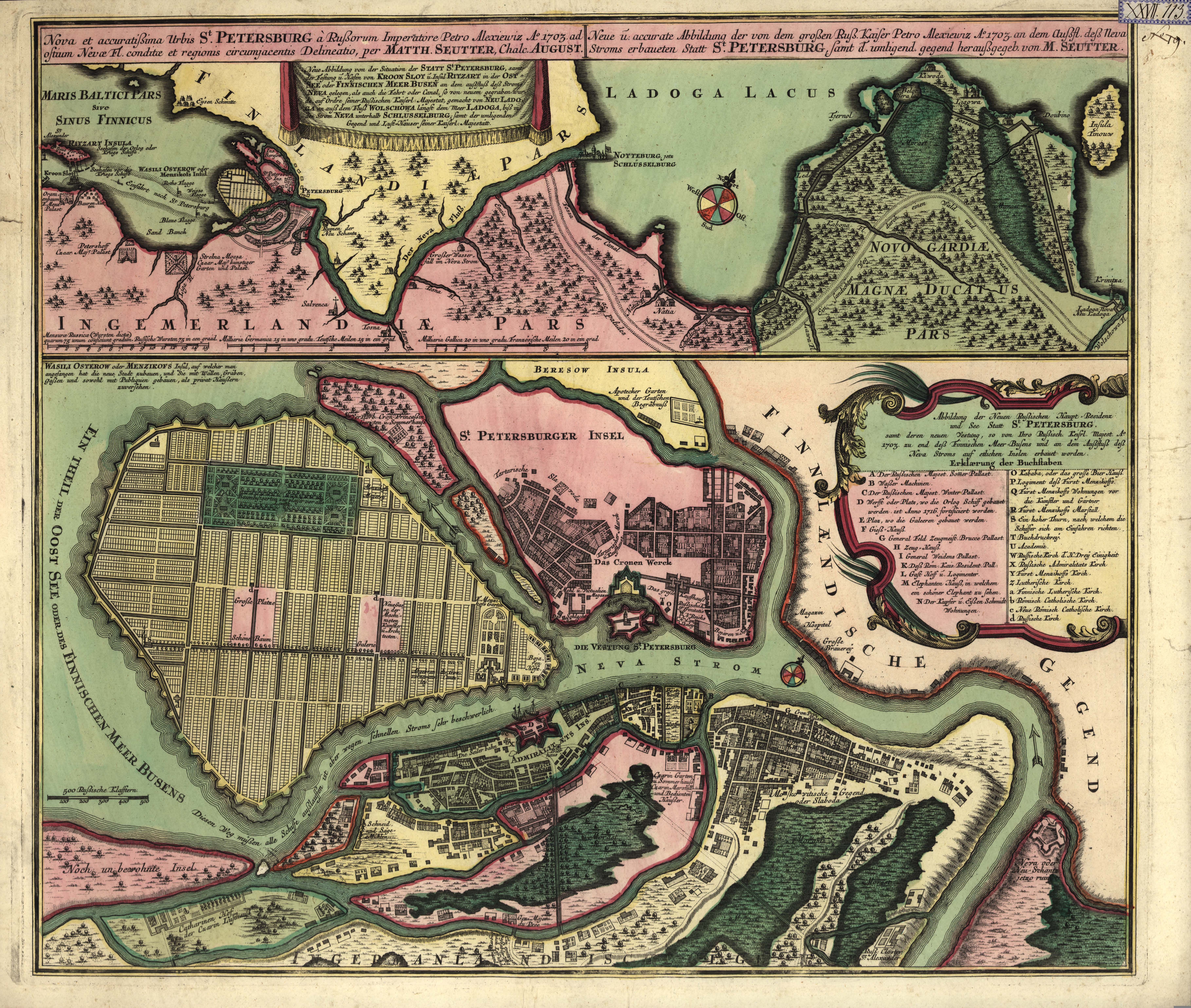 «Nova et accuratissima urbis St. Petersburg à Russorum Imperatore Petro Alexiewiz ao. 1703 ad ostium Nevæ Fl. conditæ et regionis circumjacentis delineatio / per Matth. Seutter, Chalc. August. = Neue u. accurate Abbildung der von dem grossen Russ. Kaiser Petro Alexiewiz Ao. 1703 an dem Aussfl. dess Neva Stroms erbaueten Statt St. Petersburg samt d. umligend. Gegend / heraussgegeb. von M. Seutter». Published in Augsburg, Germany.